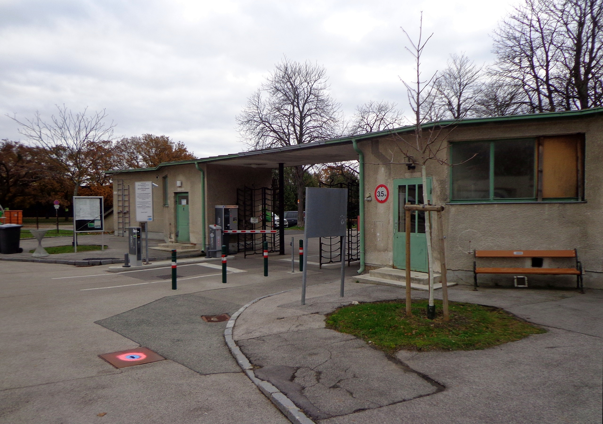 Feuerhalle Simmering - Zufahrt mit Haupteingangstor